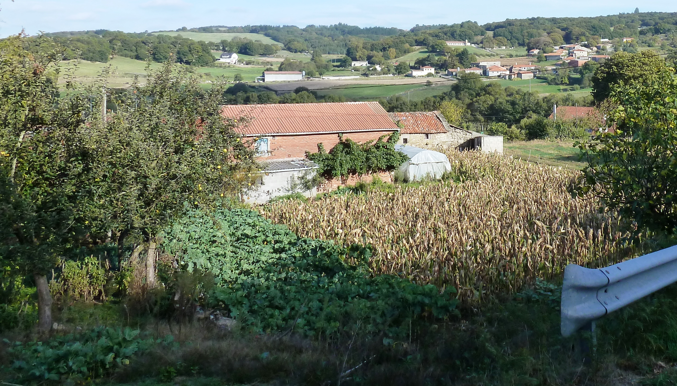 Casa da Lama de Fente, Santa Mariña, Carballedo